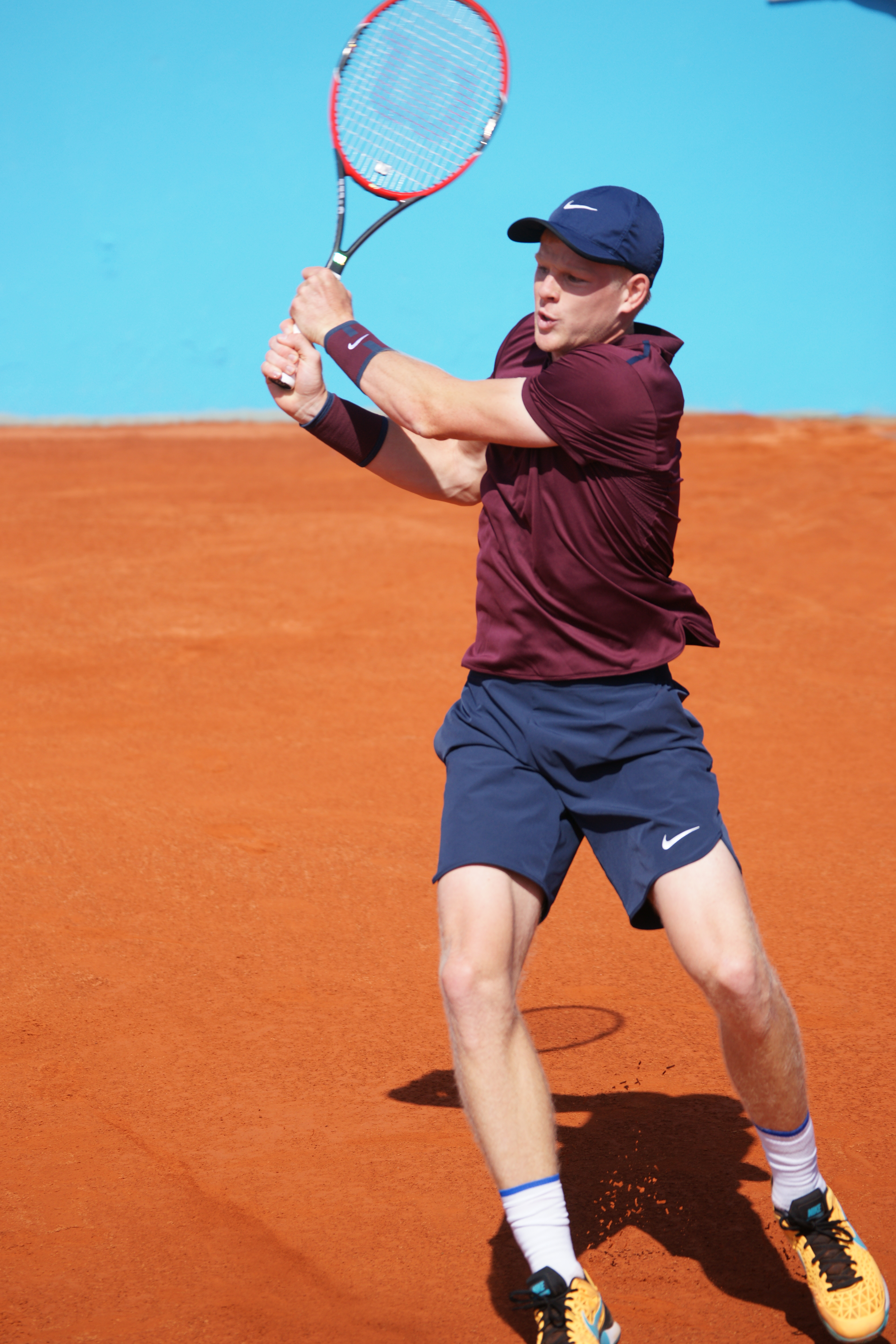 Kyle Edmund Nice ATP 2016